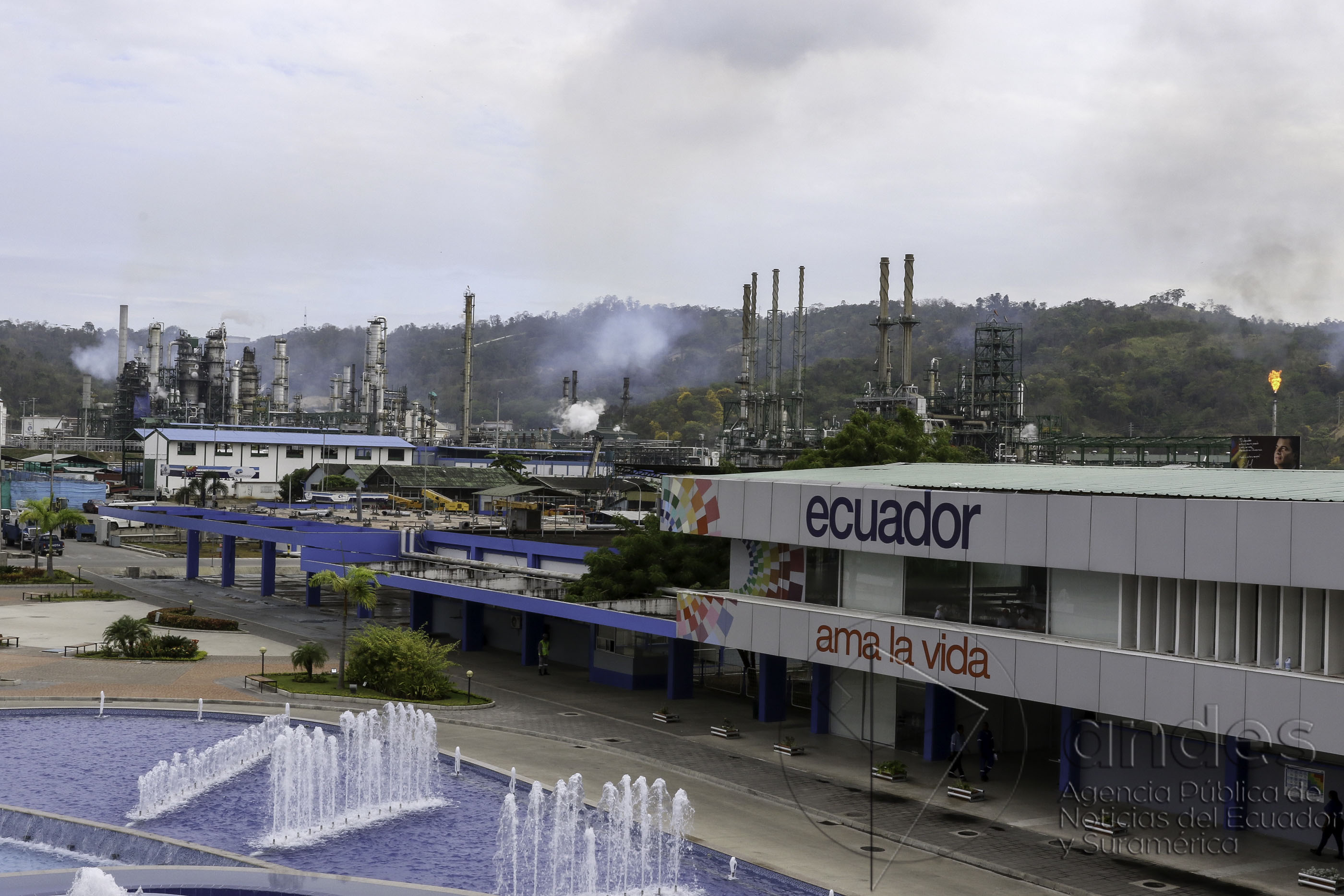 Esmeraldas, 01 dic (Andes).- La refinería de Esmeraldas operará al 100% de capacidad así lo manifestó Alex Bravo Gerente de Petroecuador. ANDES/Micaela Ayala V.